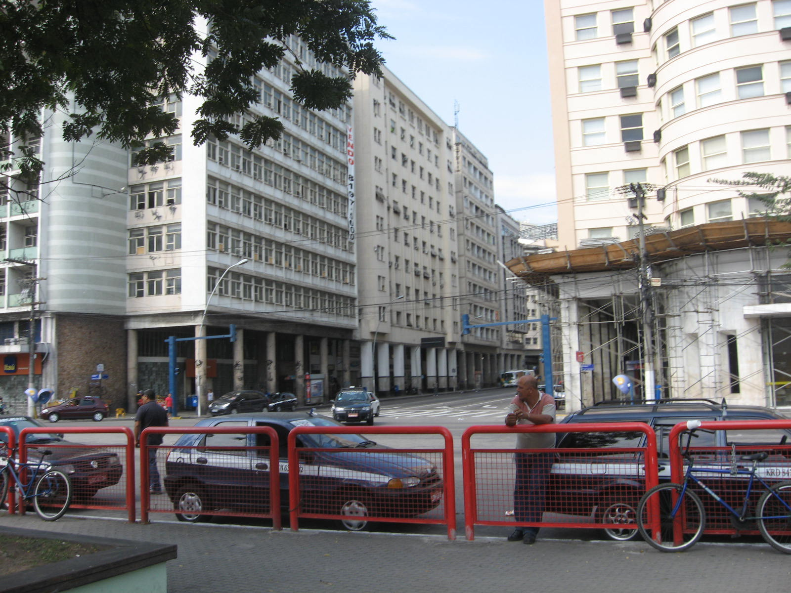 Vista do centro de Niterói, estado do Rio de Janeiro, Brasil.